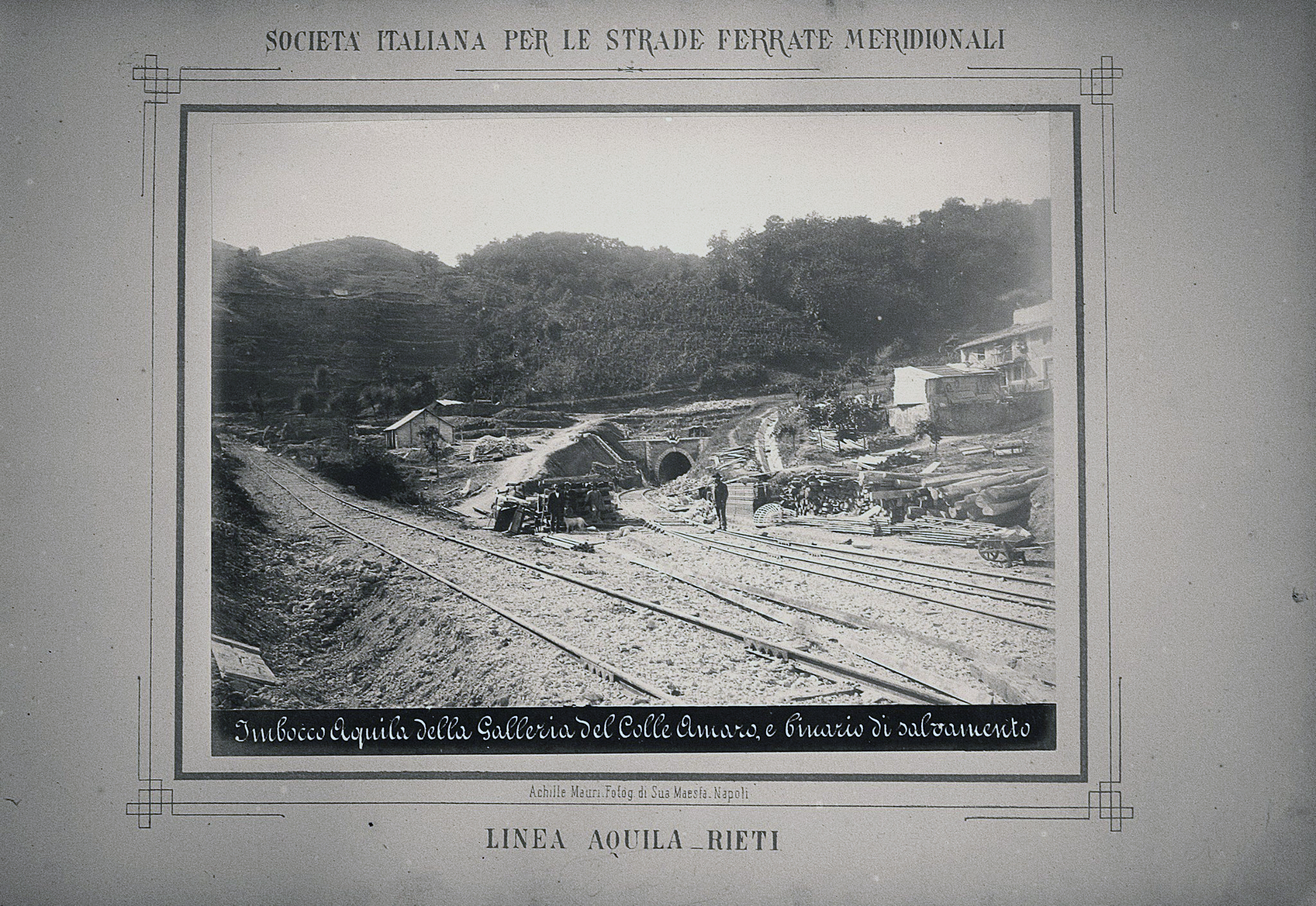 La stazione di Rocca di Fondi durante la sua costruzione, con il binario di salvamento e l'imbocco della galleria Colle Amaro. Immagine tratta dalla raccolta di fotografie sulla costruenda ferrovia Terni-Rieti-L'Aquila, realizzata da Achille Mauri per conto della "Società Italiana per le strade ferrate meridionali" e pubblicata nell'ottobre 1883.